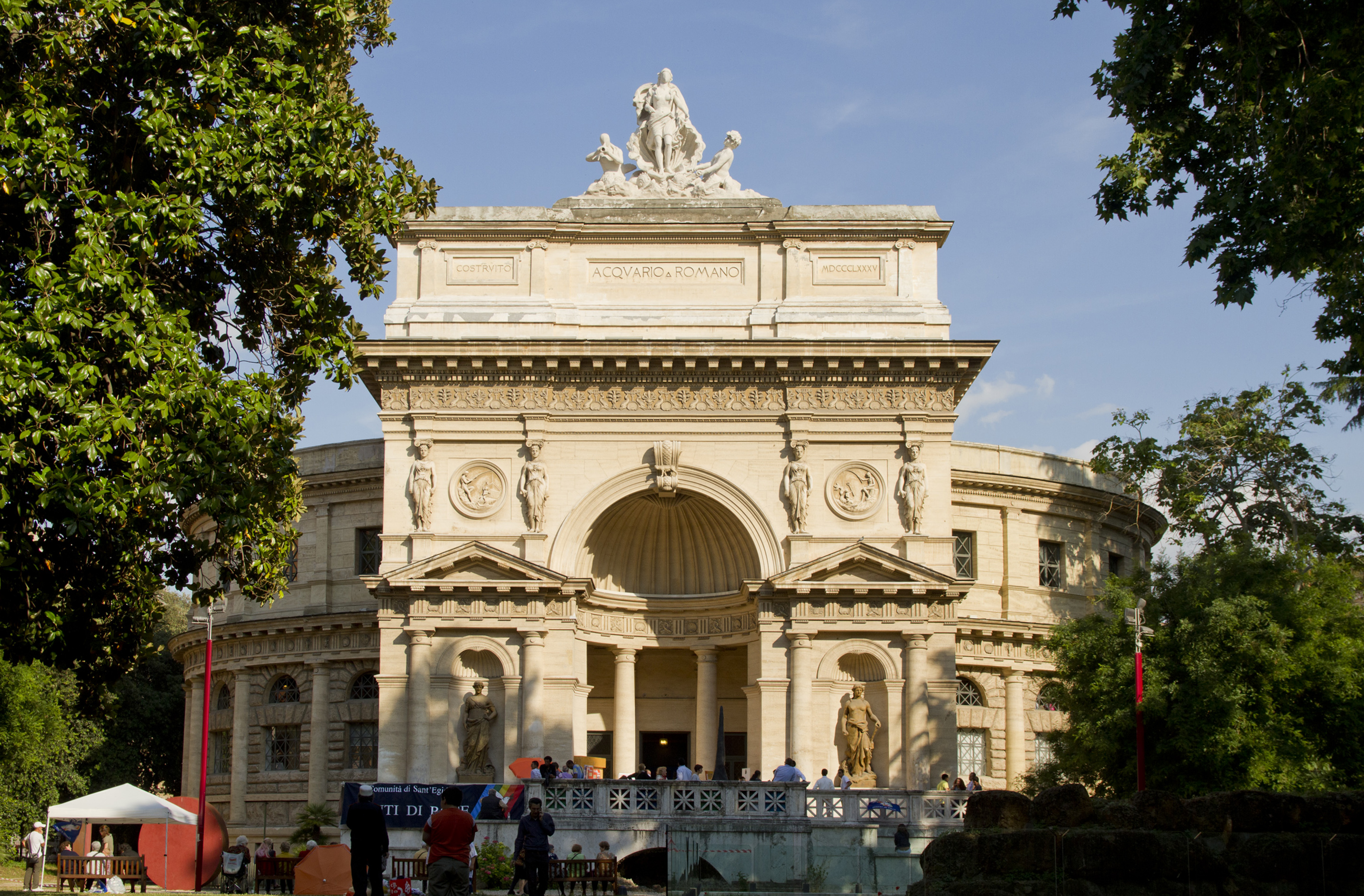 Acquario Romano, Esquilino, Rome, Lazio, Italy